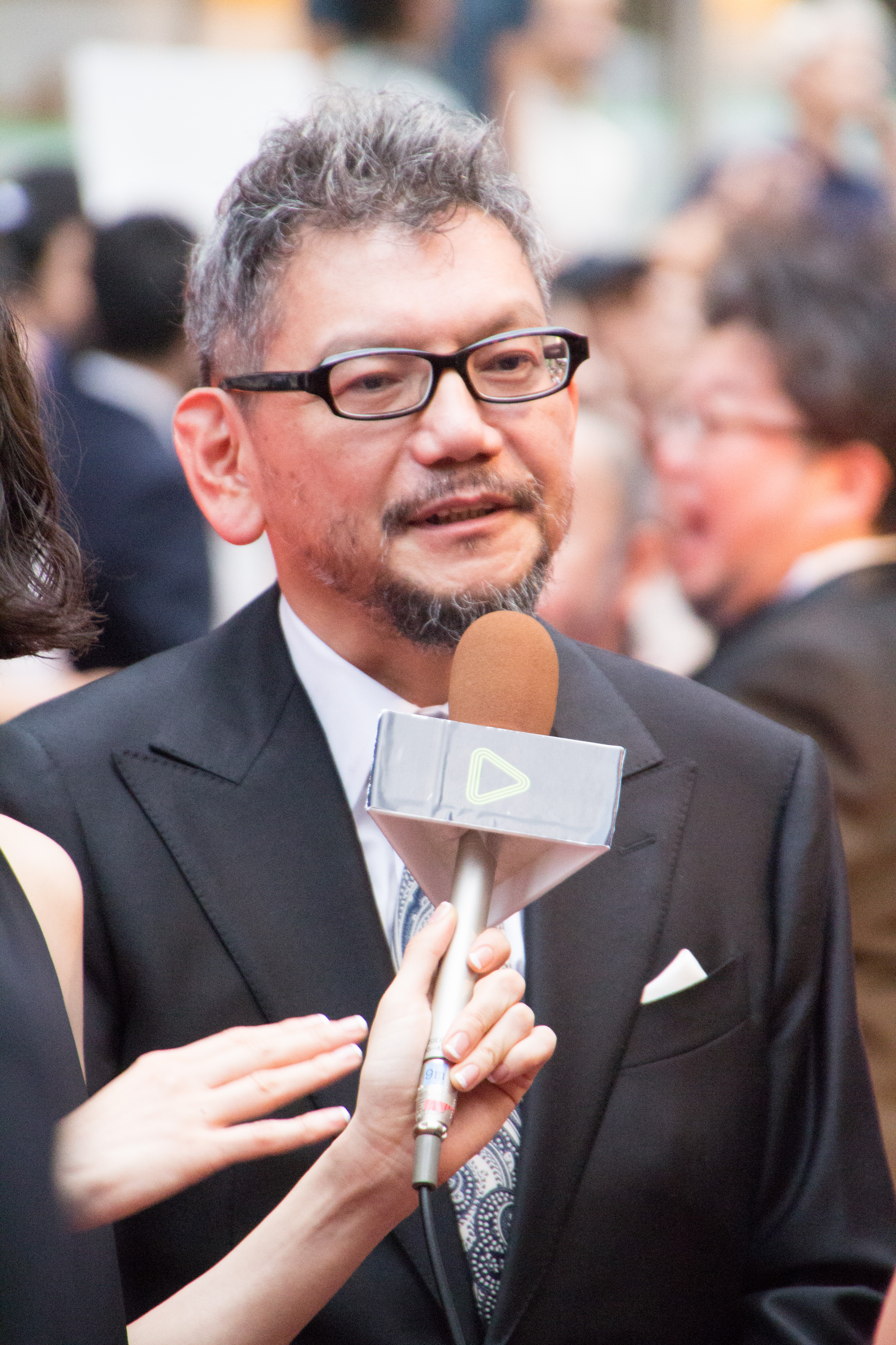 シン・ゴジラ ワールドプレミア レッドカーペットイベント 庵野秀明